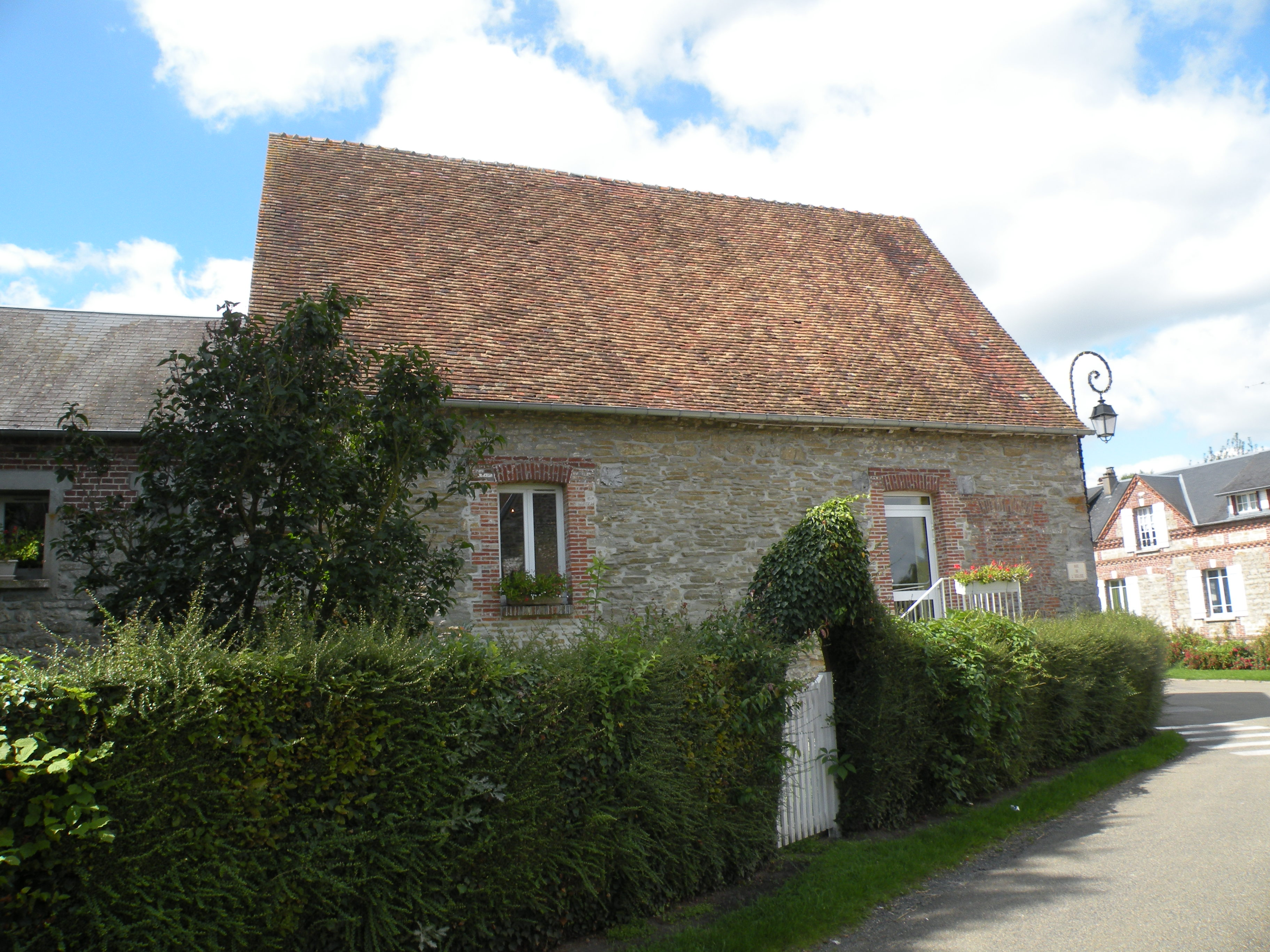 Senantes (Oise)